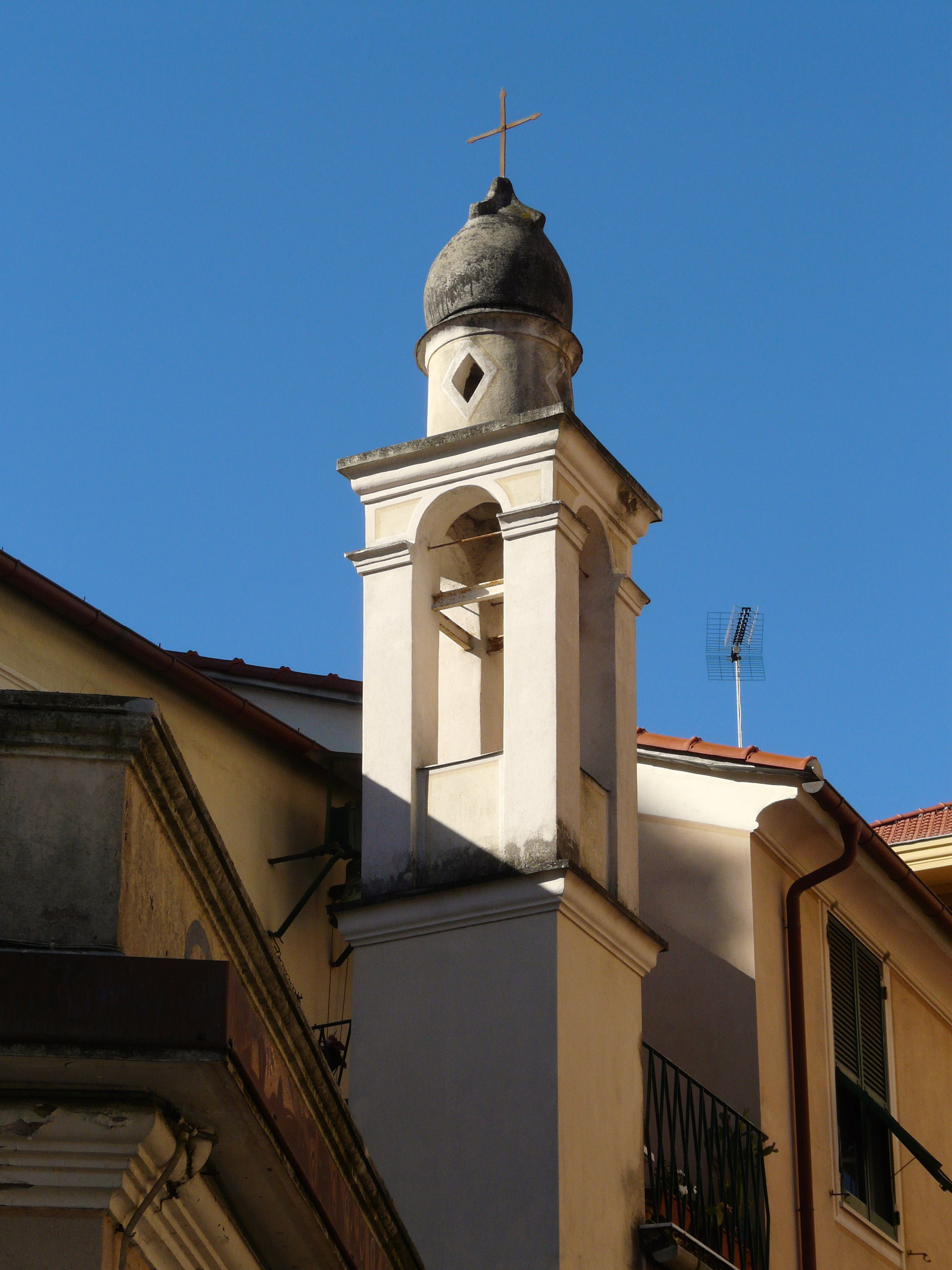 Campanile dell'oratorio della Madonna del Suffragio, Santa Margherita Ligure, Liguria, Italia